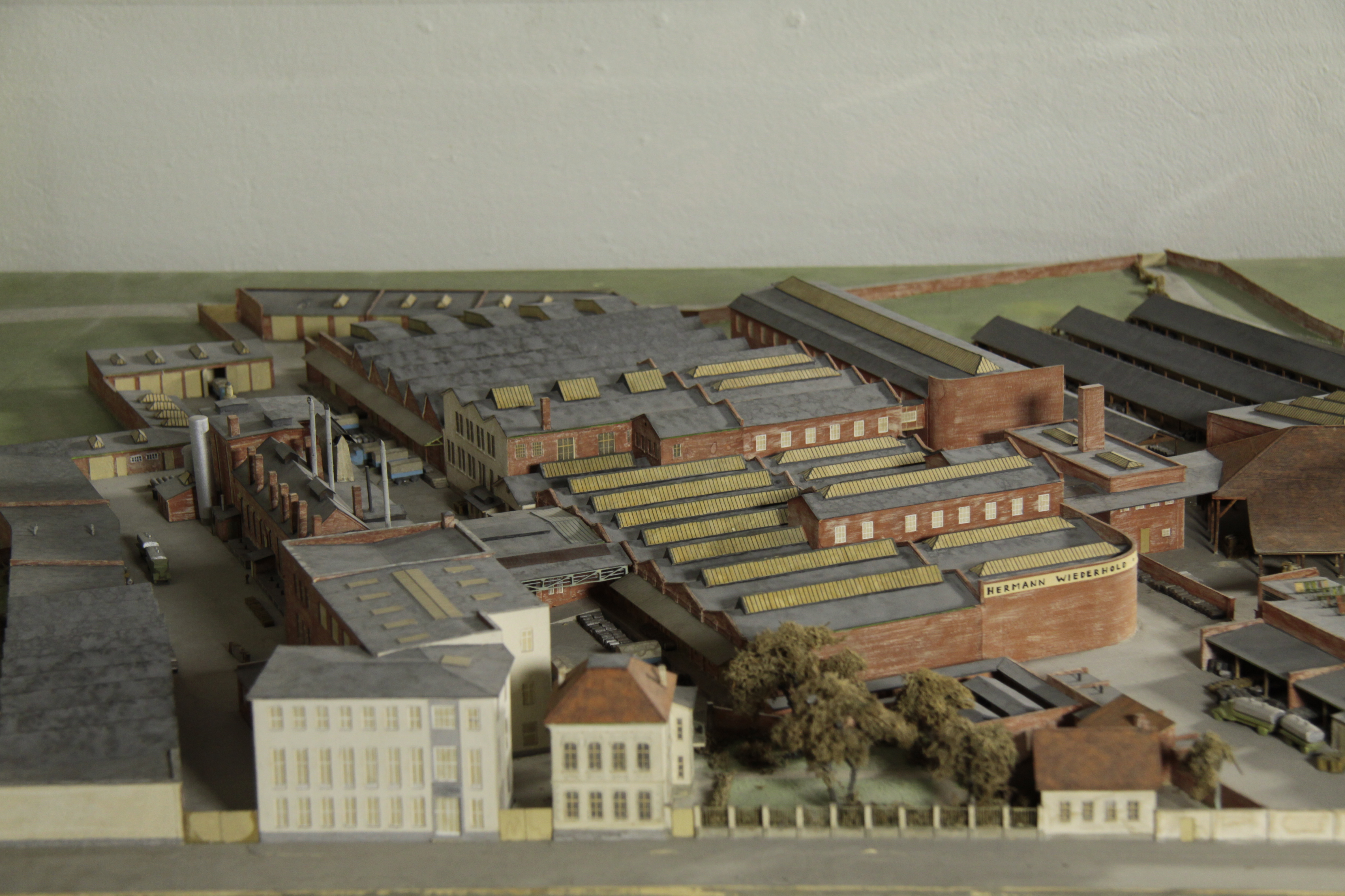 Foto des Modells der Firma Wiederhold in Hilden, Düsseldorfer Straße Standort: Stadtarchiv Hilden